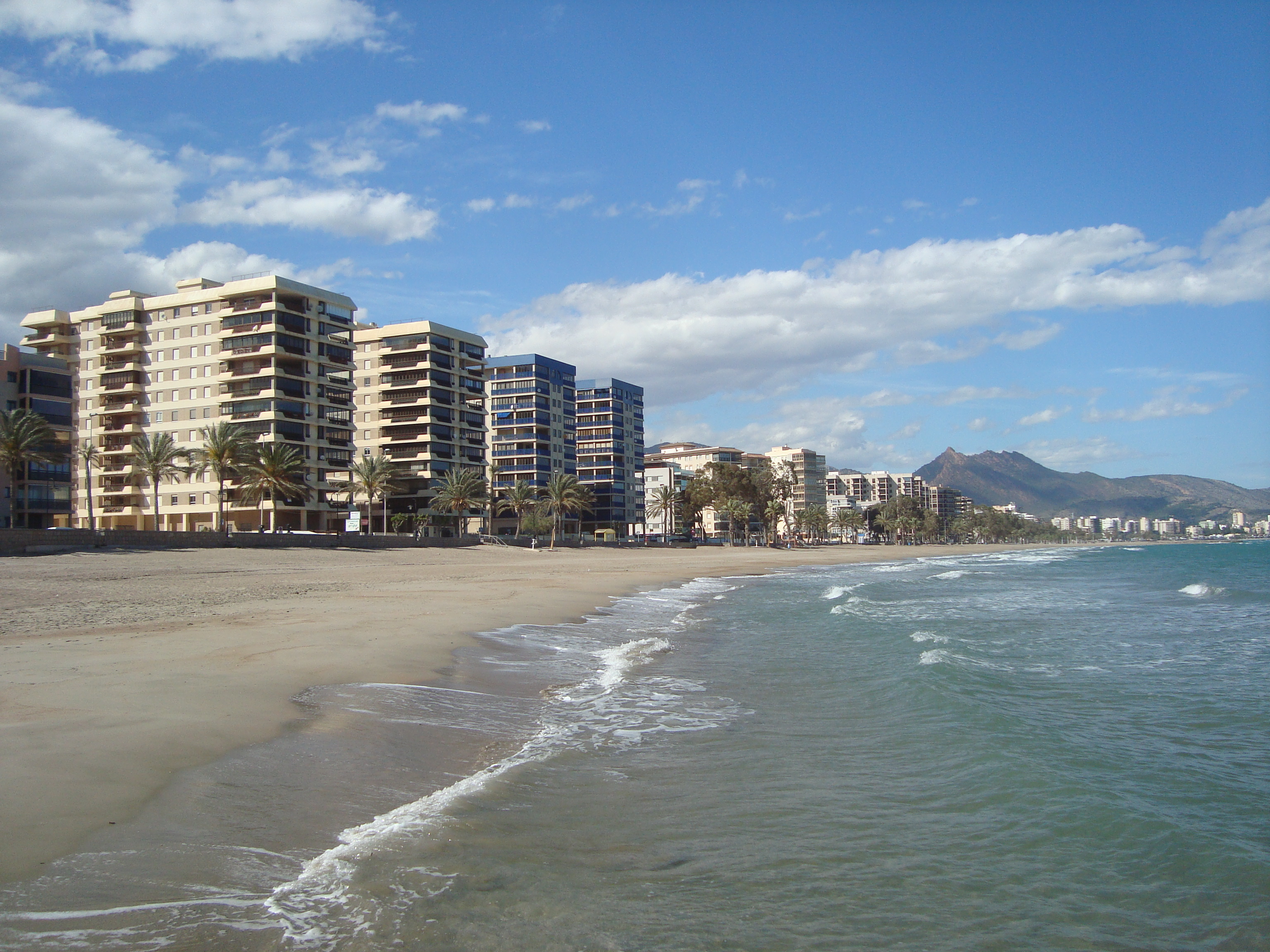 Platja d'Heliòpolis (Benicàssim) This is a a photo of a beach in the Land of Valencia, Spain, with id: PL-1425